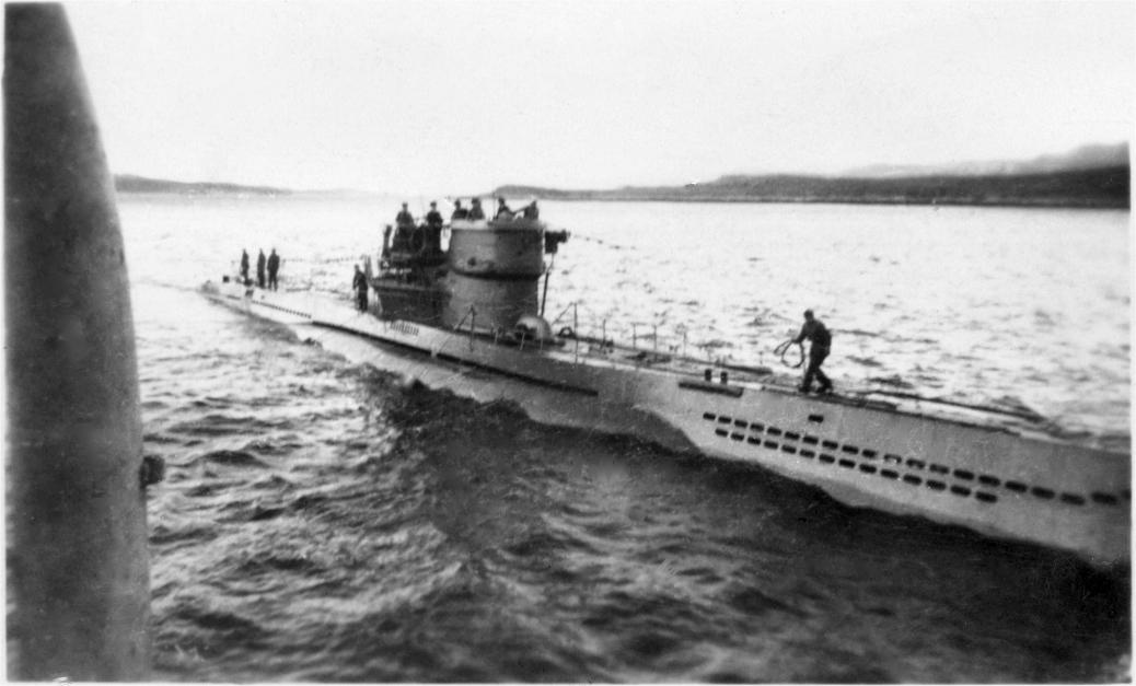 U 992 klar til å kaste en line over til HMC Nene i Loch Eriboll.